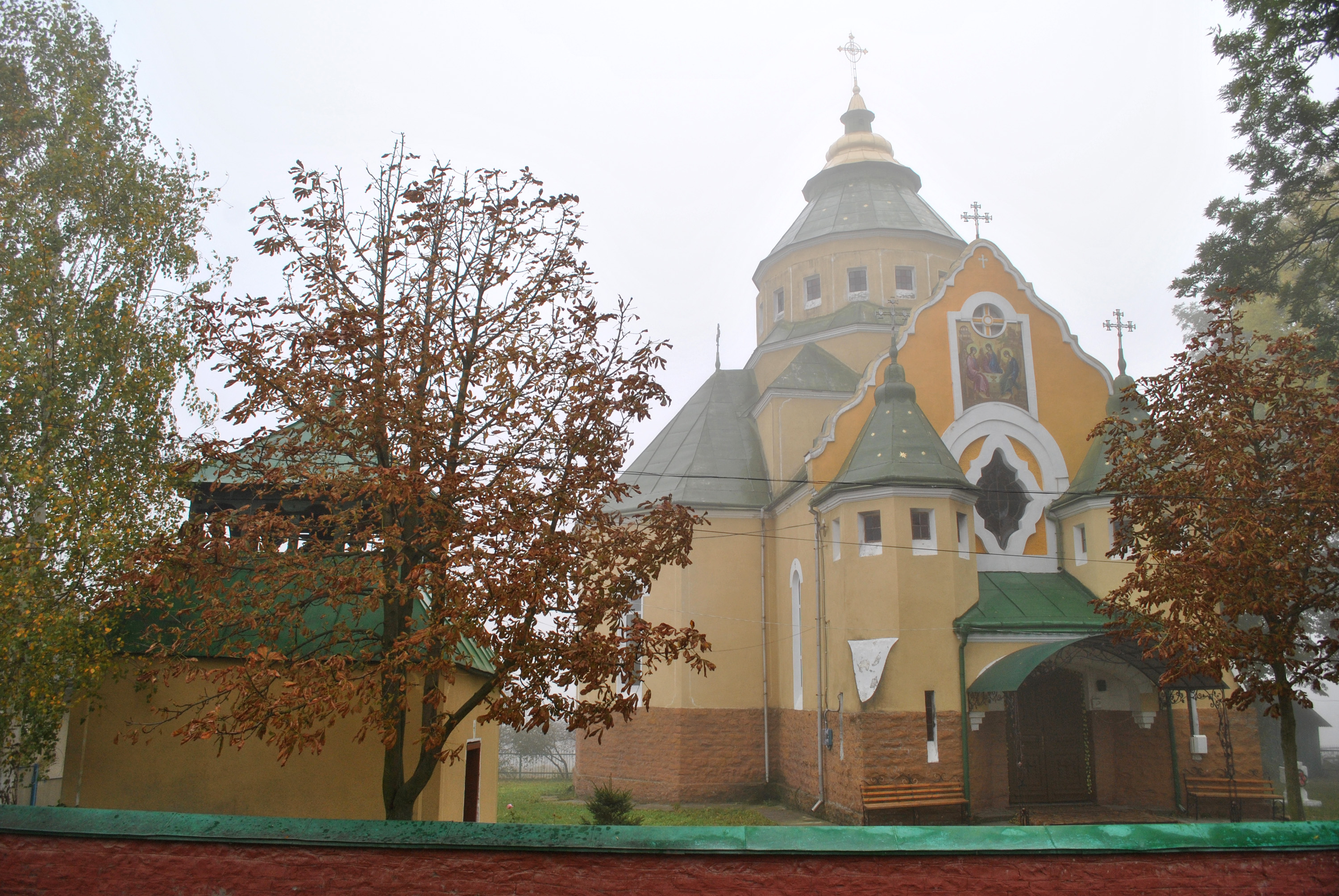 Церква Святої Трійці (мур.) у селі Пишківці Бучацького району Тернопільської області.